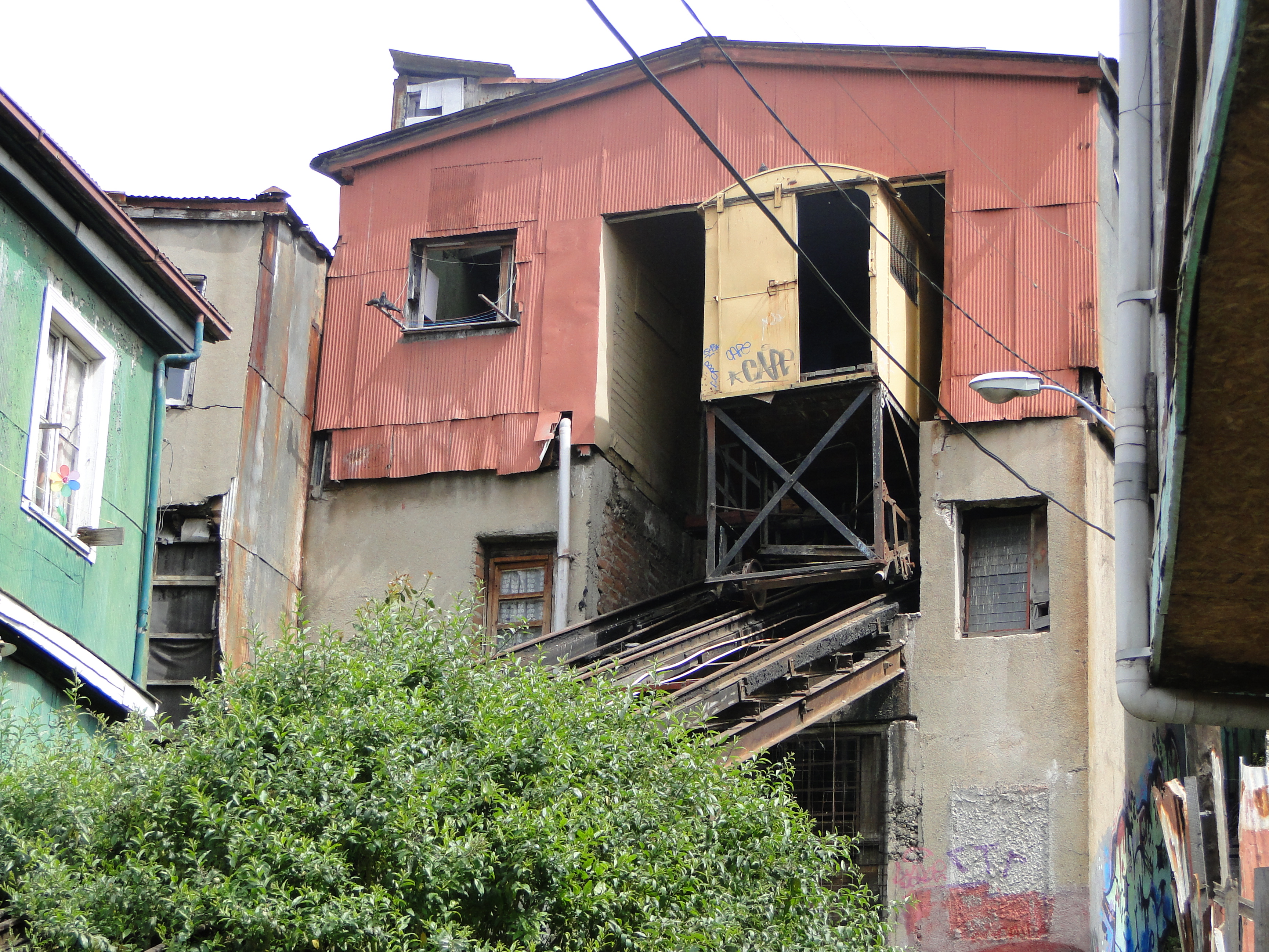 Ascensor Florida This is a photo of a national monument in Chile: 770